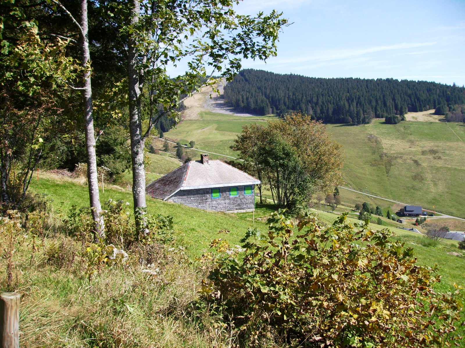 Martin Heidegger Hütte über Rütte, Todtnauberg; Heidegger's mountain hut